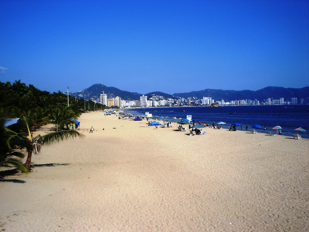 Panorama de la Playa Hornos (de oeste a este) en su área Tamarindos en Acapulco, Guerrero, México.